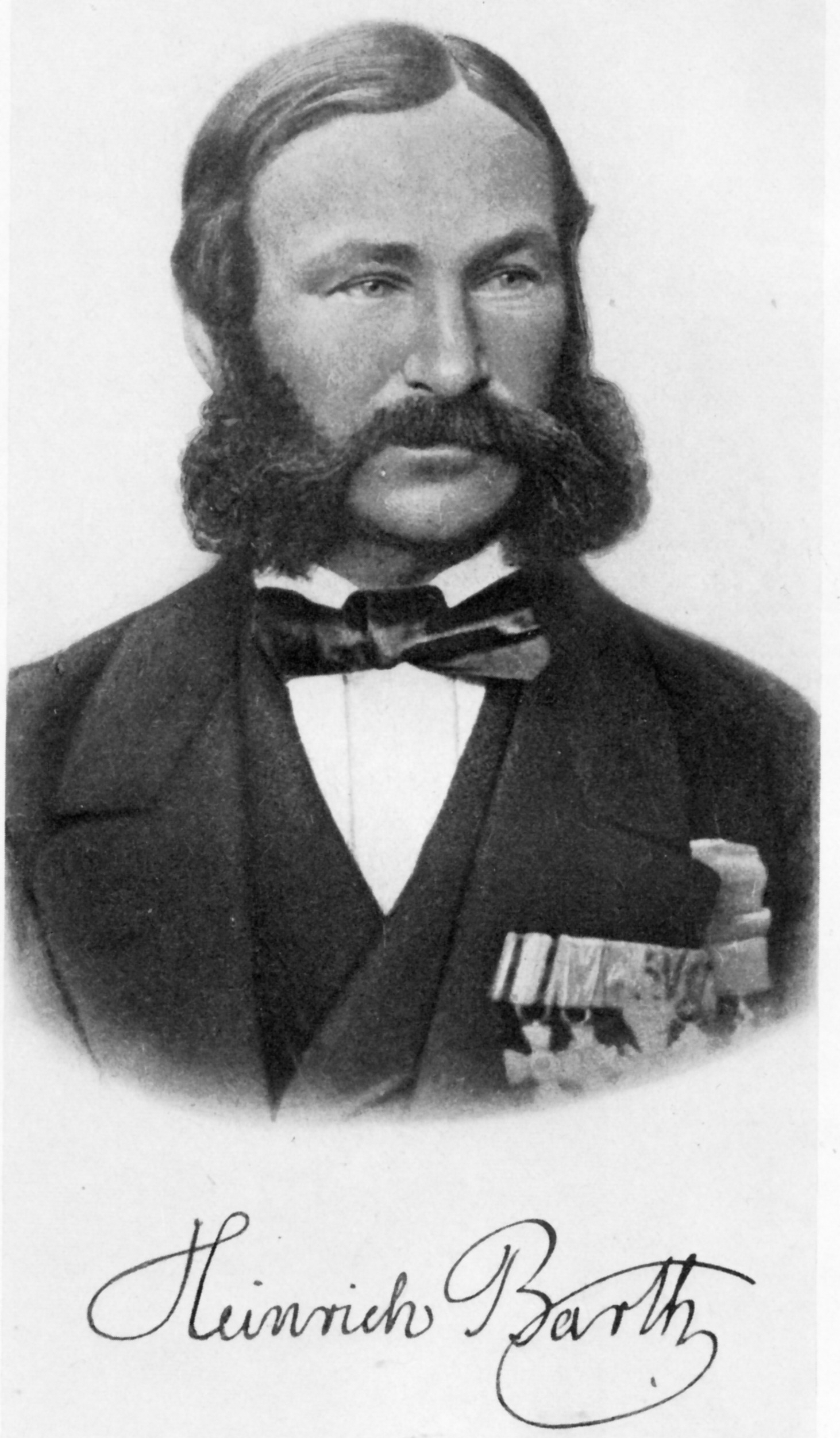 Der deutsche Afrikaforscher und Wissenschaftler Heinrich Barth samt seiner Unterschrift.